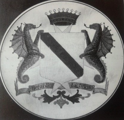 Stemma dei Berardi, conti dei Marsi